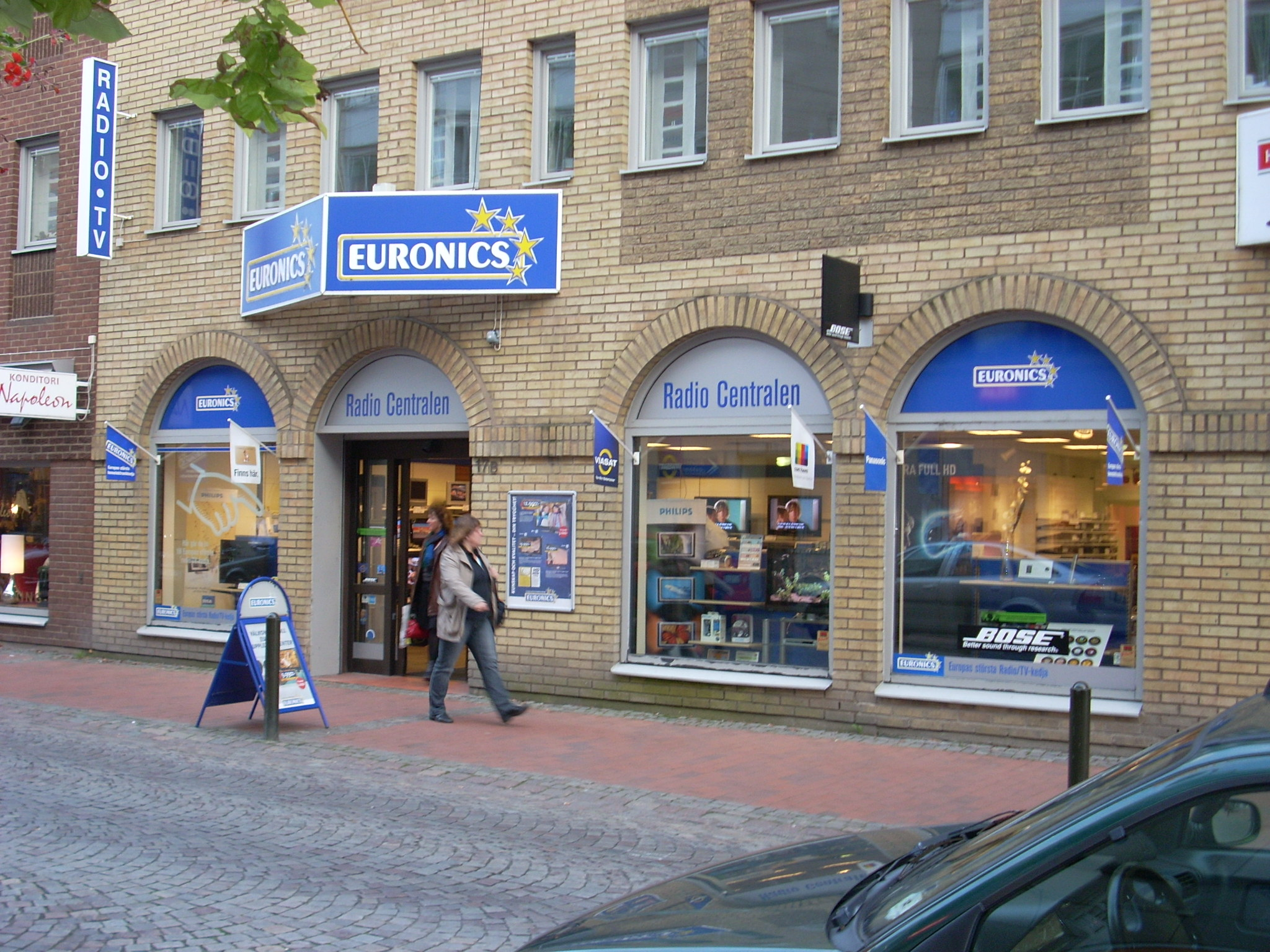 Euronics på Barnarpsgatan i Jönköping